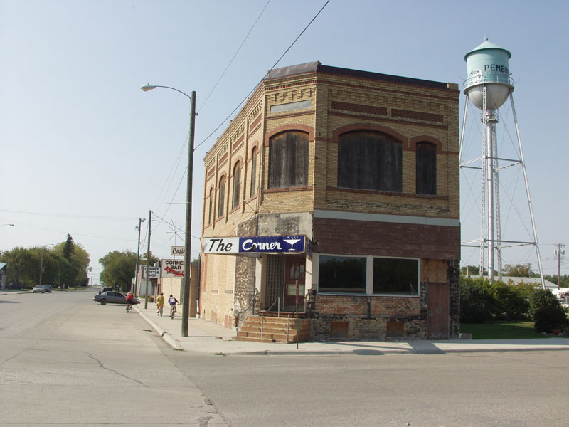 Pembina, North Dakota. From .